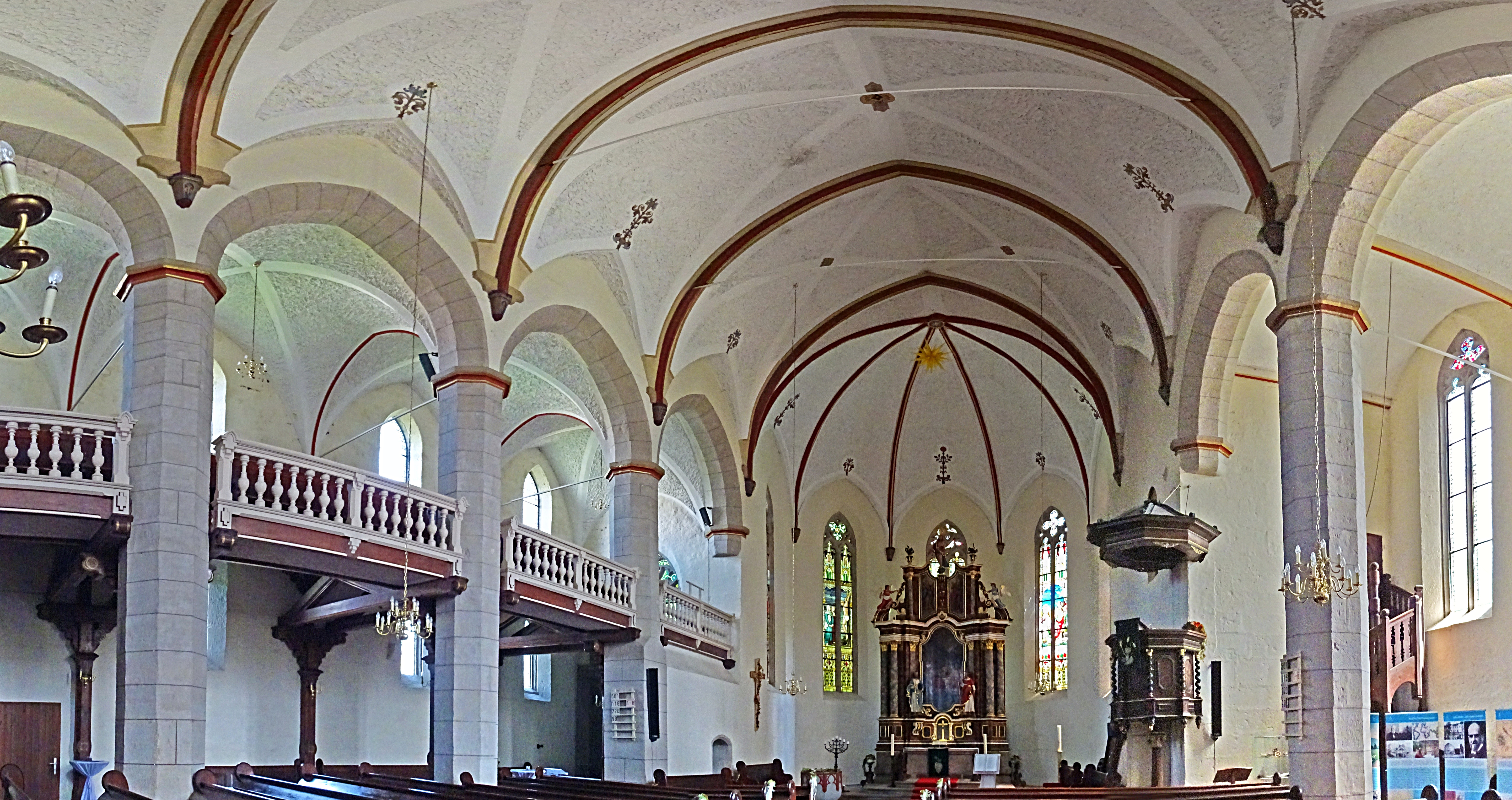 Innenraum Panorama, Blick zum Altar in St. Petri (Mühlhausen, Thüringen)